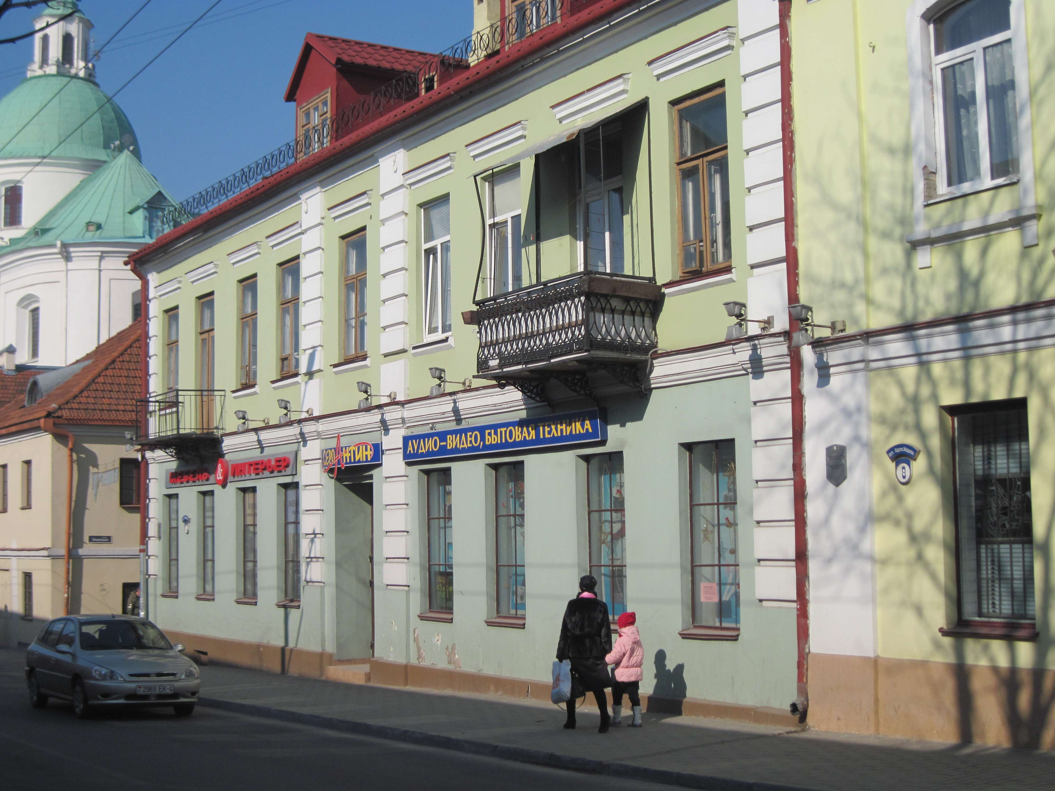 Беларуская (тарашкевіца): Забудова гістарычнага цэнтра Гродна. Вуліца К. Маркса, 6.